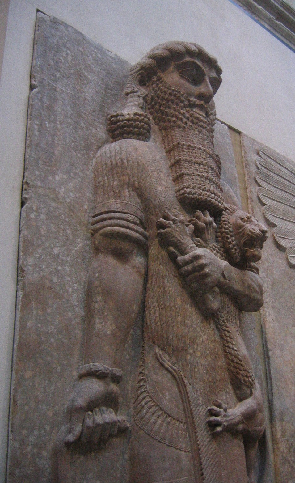 Héros maîtrisant un lion, VIIIe siècle avant J.-C., palais du roi assyrien Sargon II à Dur-Sharrukin, actuelle Khorsabad en Irak au Musée du Louvre